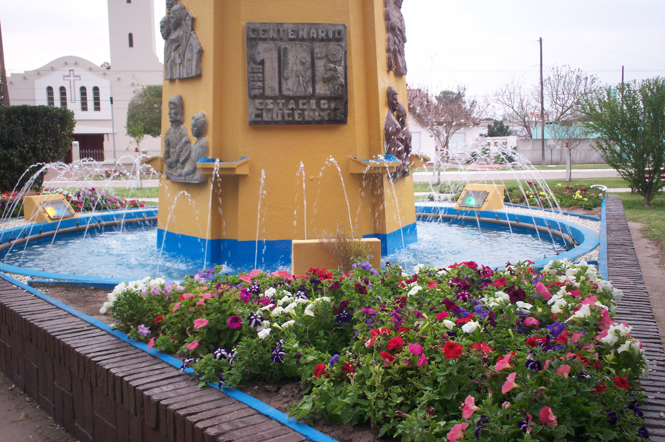 estacion clucellas